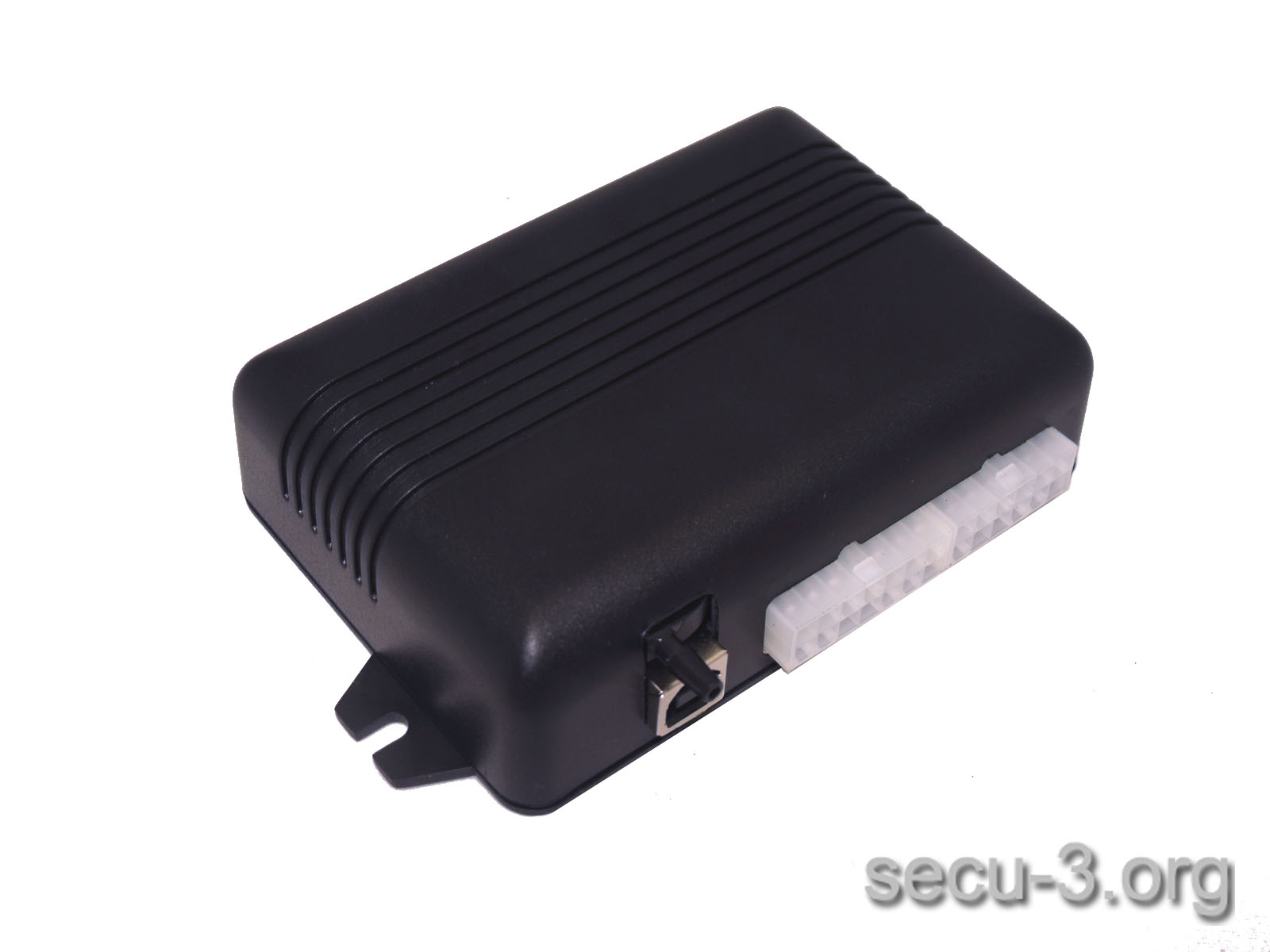 Блок SECU-3T ревизии revC с ДАД